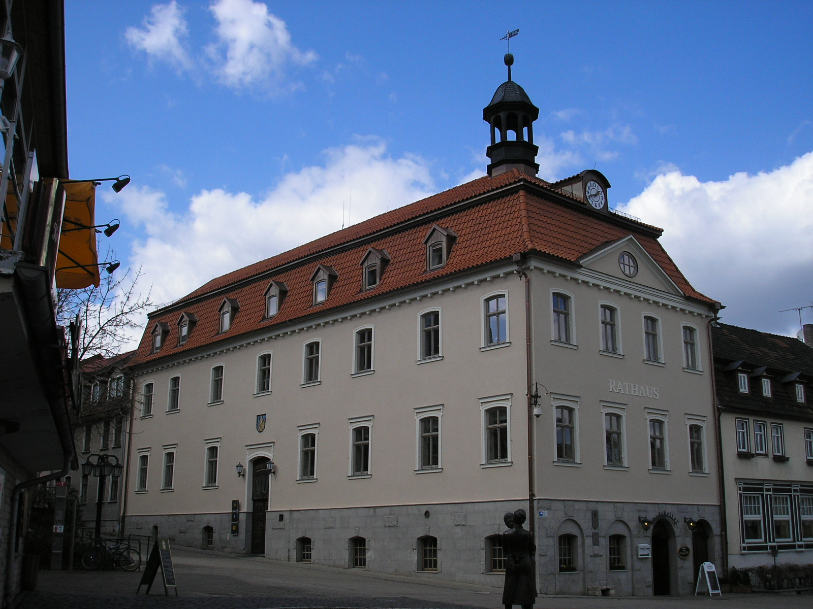 Das Rathaus in Bad Salzungen (Thüringen)